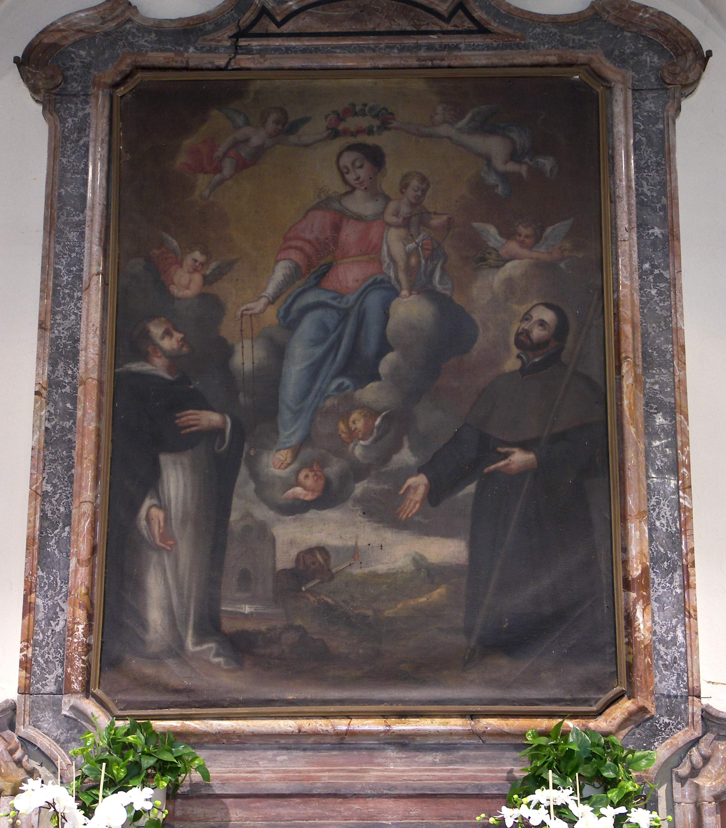 Opera dipinta da Agostino Santagostino, pala d'altare ubicata nell'Oratorio di San Francesco a Pusiano, provincia di Como